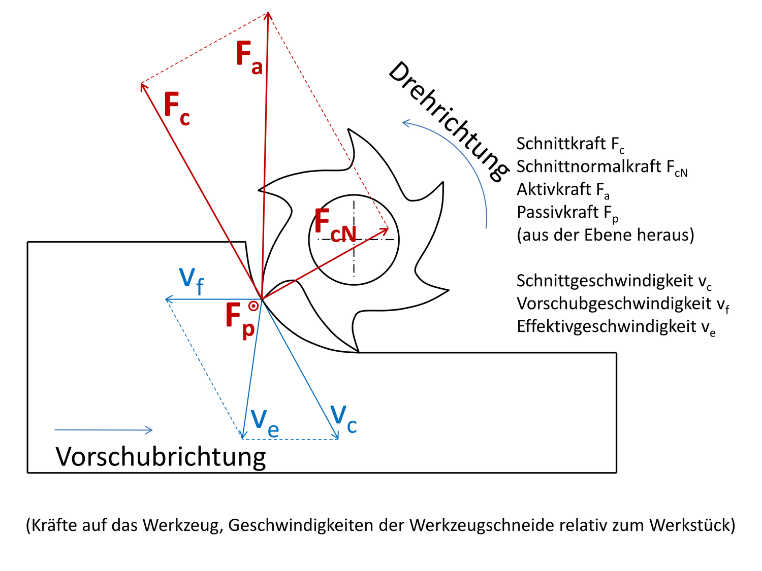 Darstellung der Bearbeitungskräfte beim Gleichlauffräsen